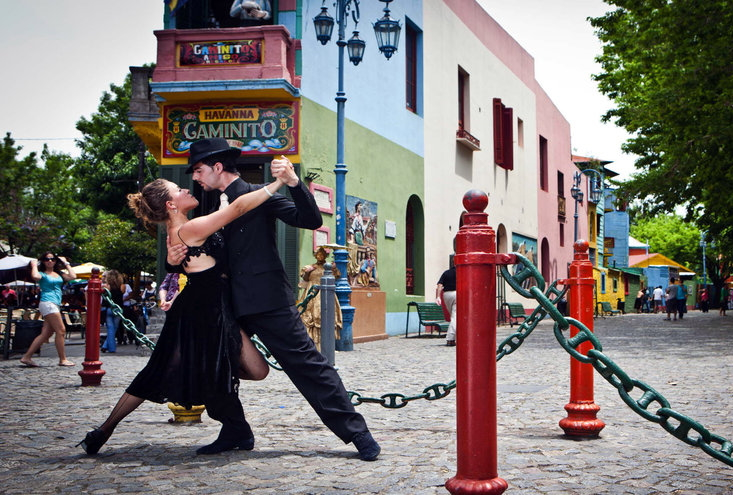 Pareja de Tango bailando en Caminito